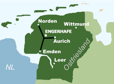 Map KZ Engerhafe